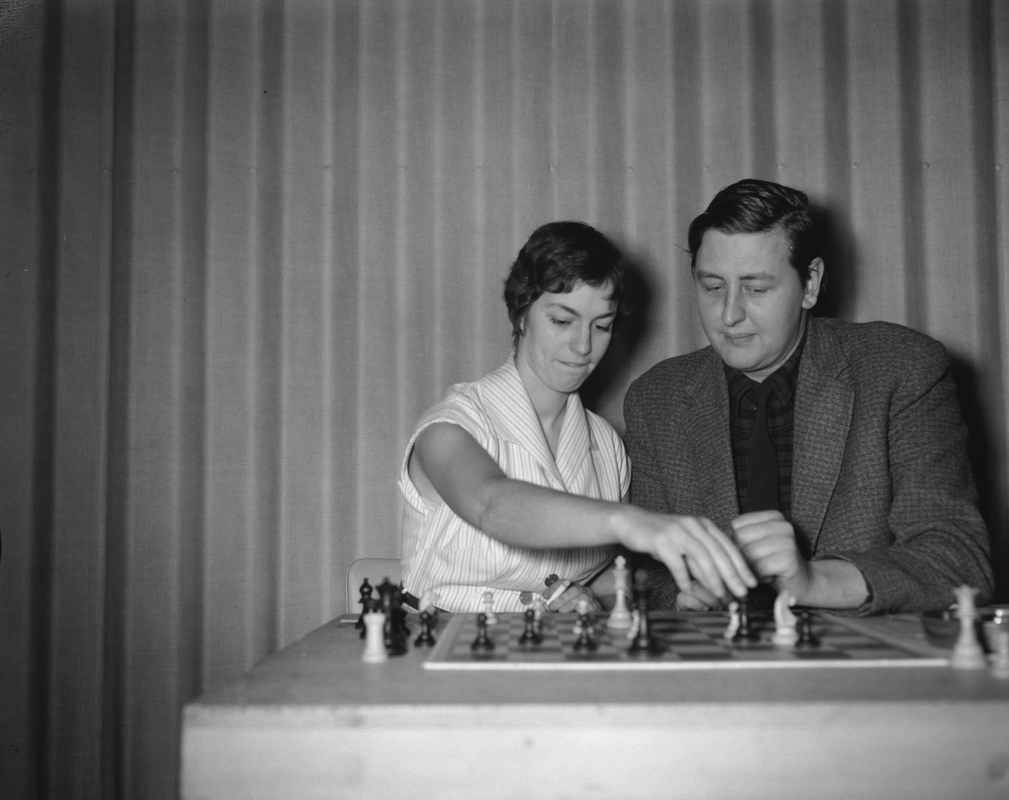 Collectie / Archief : Fotocollectie Anefo Reportage / Serie : [ onbekend ] Beschrijving : Laatste schaakpartij om het kampioenschap van Nederland in de Kroon, Jan Hein Donner en verloofde Datum : 22 december 1958 Locatie : Amsterdam Trefwoorden : schaken Persoonsnaam : Donner, Jan Hein Fotograaf : Bilsen, Joop van / Anefo Auteursrechthebbende : Nationaal Archief Materiaalsoort : Negatief (zwart/wit) Nummer archiefinventaris : bekijk toegang 2.24.01.04 Bestanddeelnummer : 910-0521